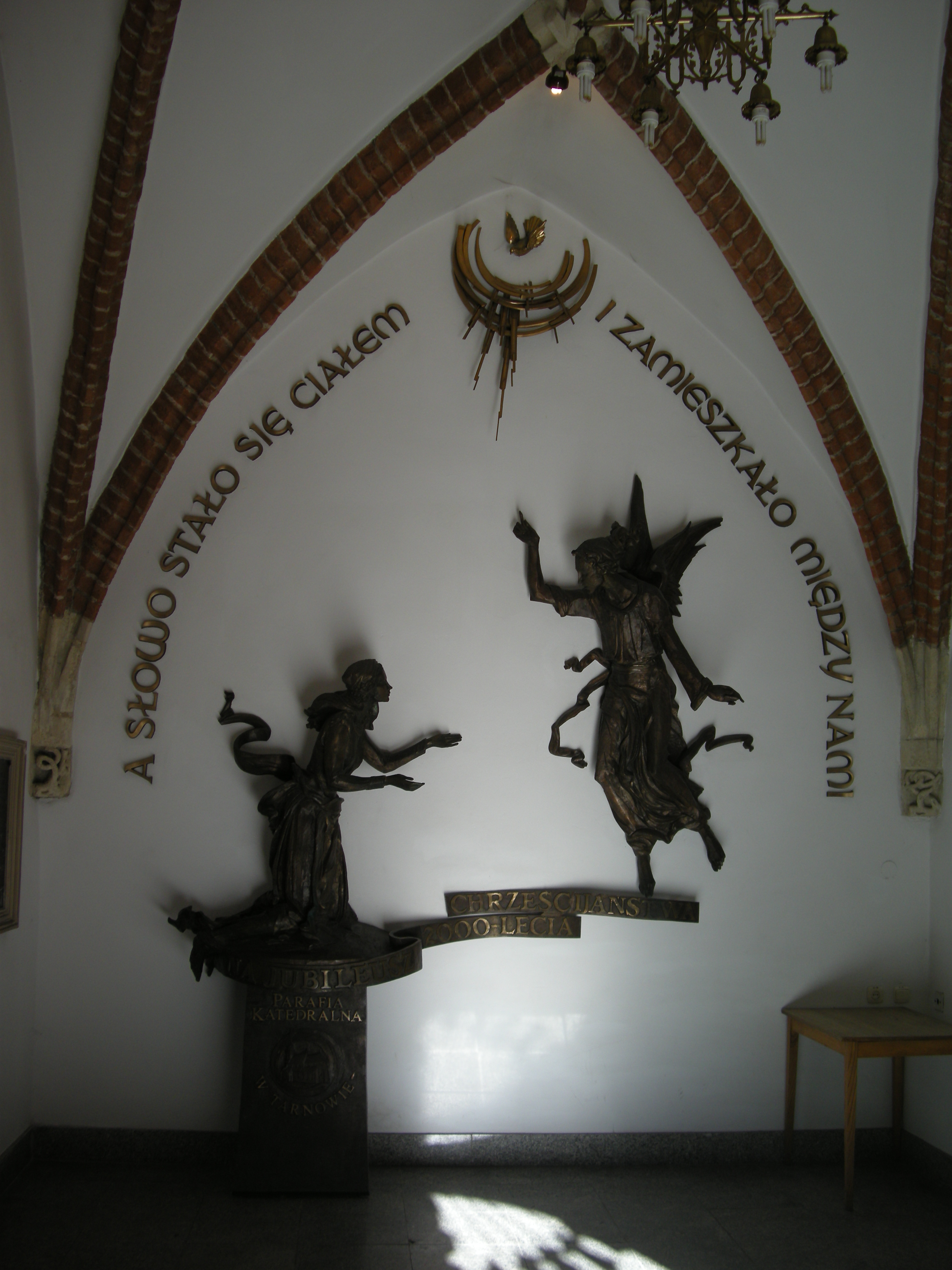 Scena Zwiastowania w przedsionku południowym.